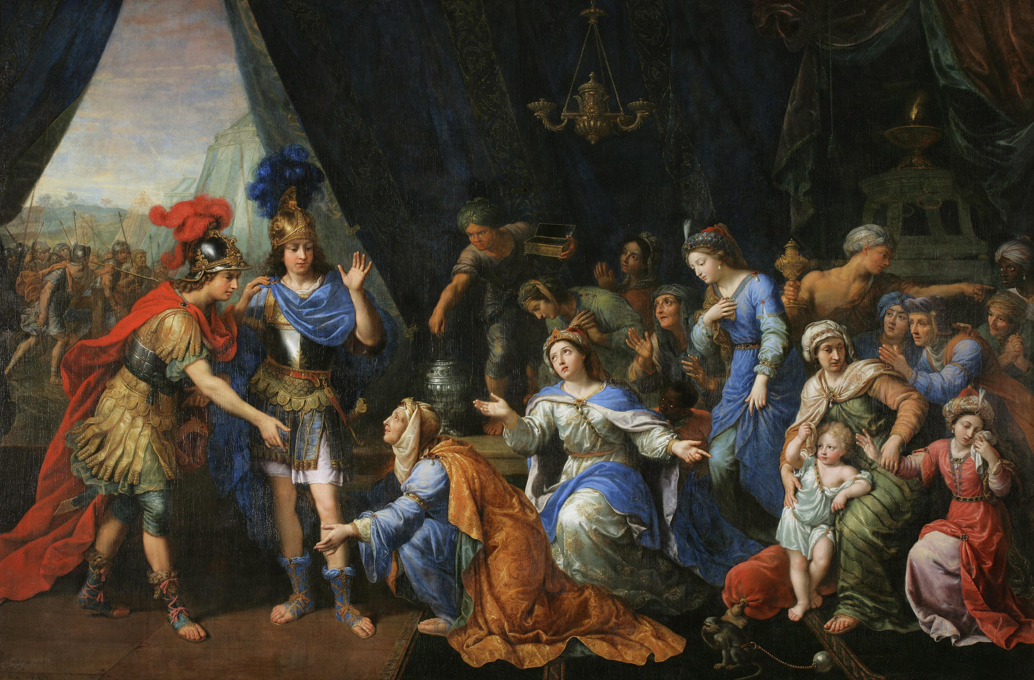 Les reines de Perse aux pieds d'Alexandre, Pierre Mignard. Musée de l'Hermitage, Saint-Petersbourg, Russie.